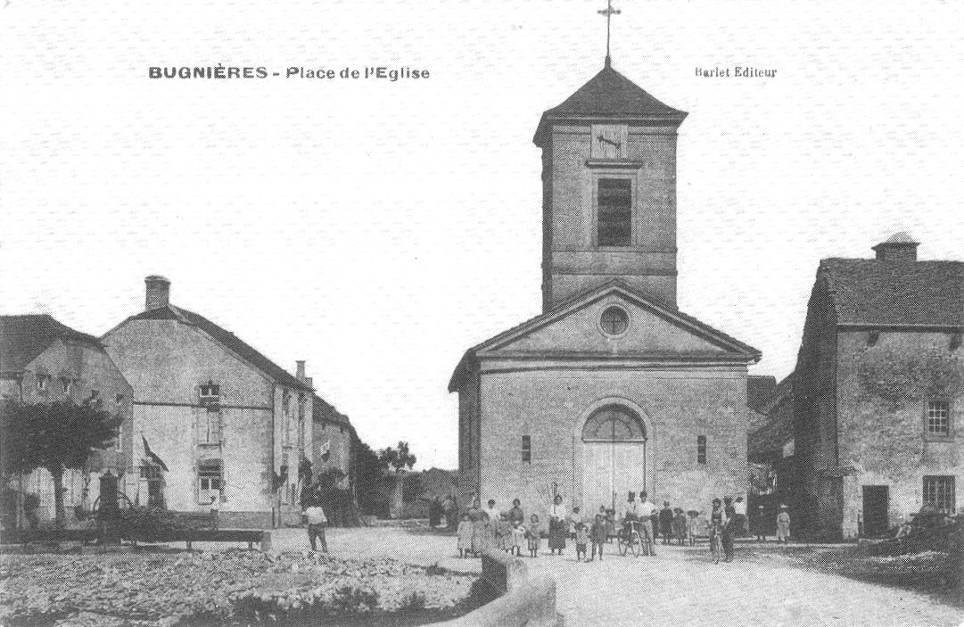 Carte postale ancienne Place de l'Église à Bugnières, Haute-Marne, France